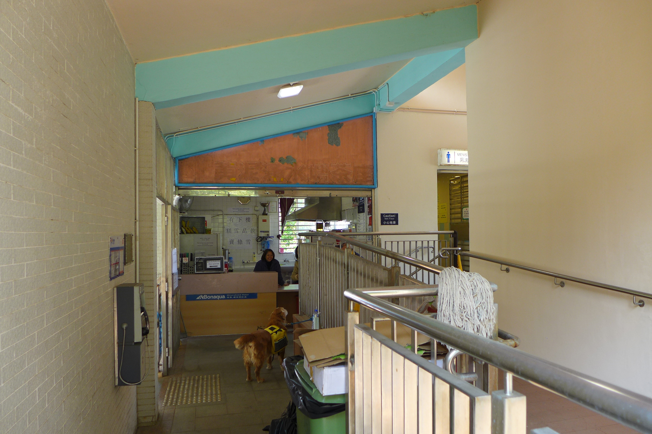 Wong Nai Chung Reservoir Pier Cafe snack bar